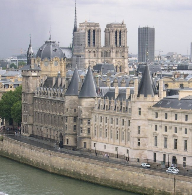 Description : Conciergerie à Paris Source : photographie prise le fr:11 septembre fr:2004 depuis le dernier étage de la Samaritaine par Raph. Licence : 2004 Raph